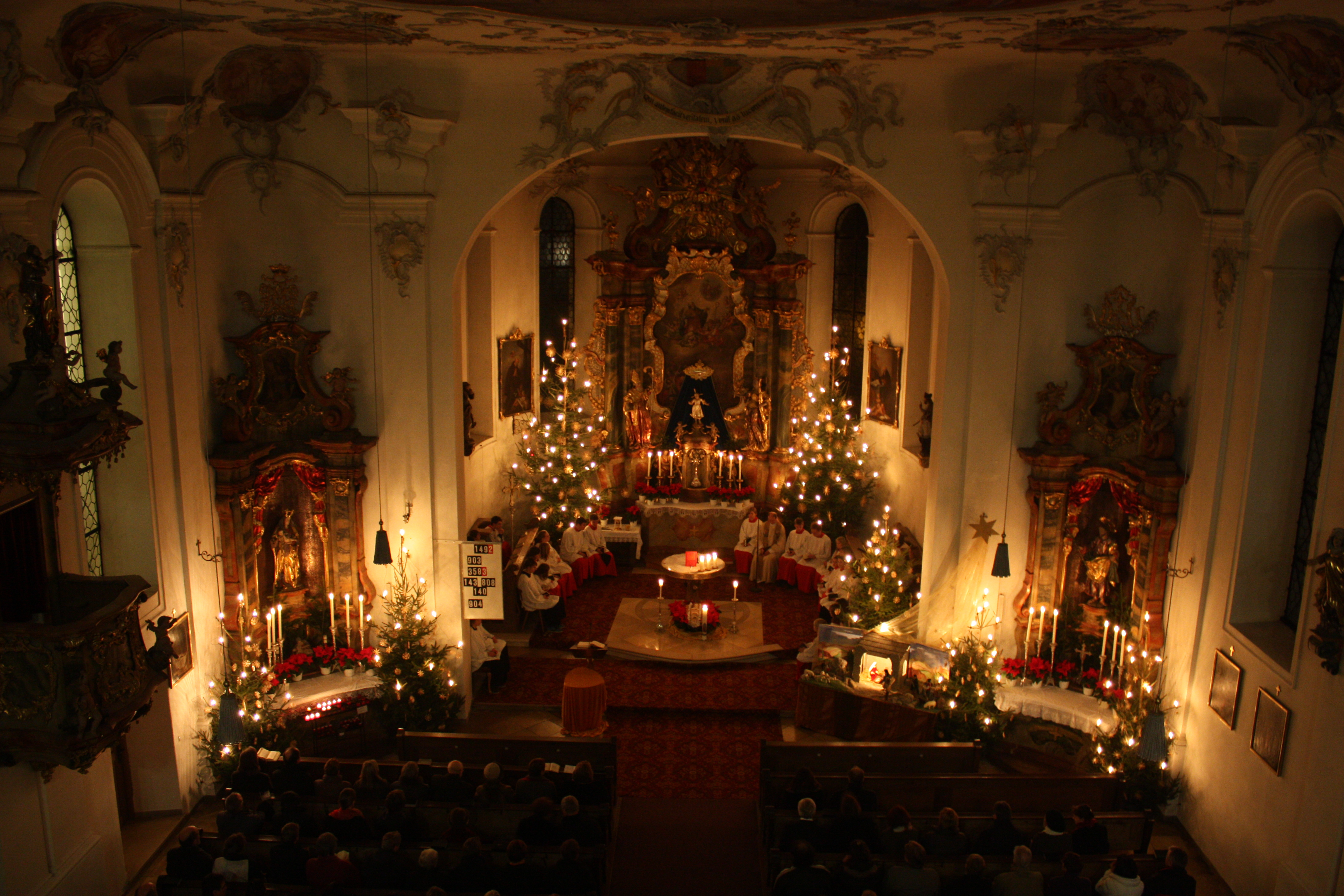 Hauptschiff von St. Ulrich in Amendingen bei Memmingen an der Weihnachtsmette 2009